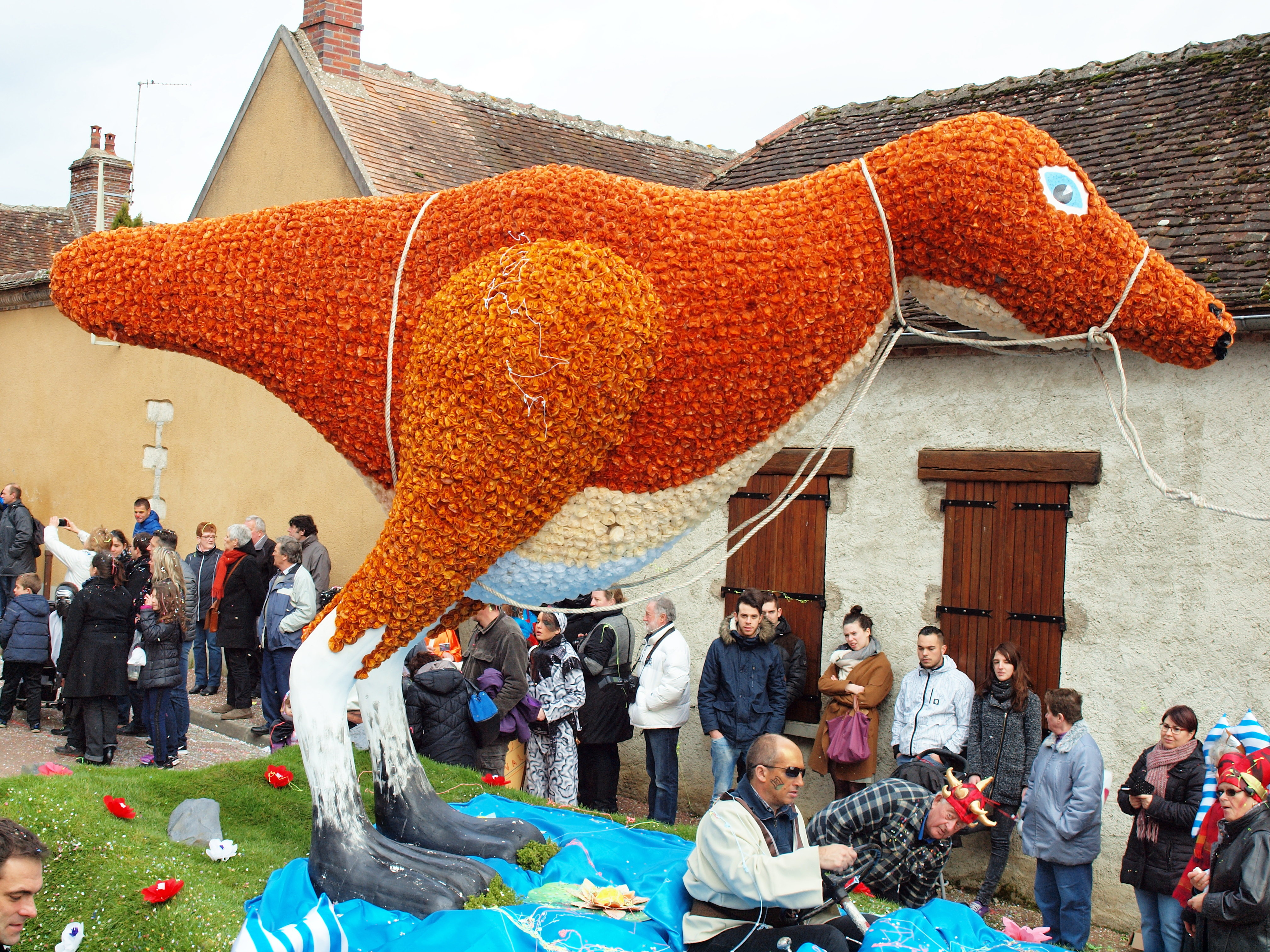 Carnaval de Sergines (Yonne, France) ; 2016